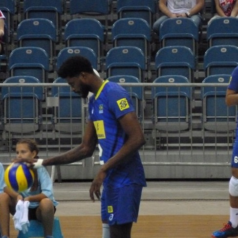 Zdjęcie zrobione podczas Memoriału Huberta Jerzego Wagnera 2019